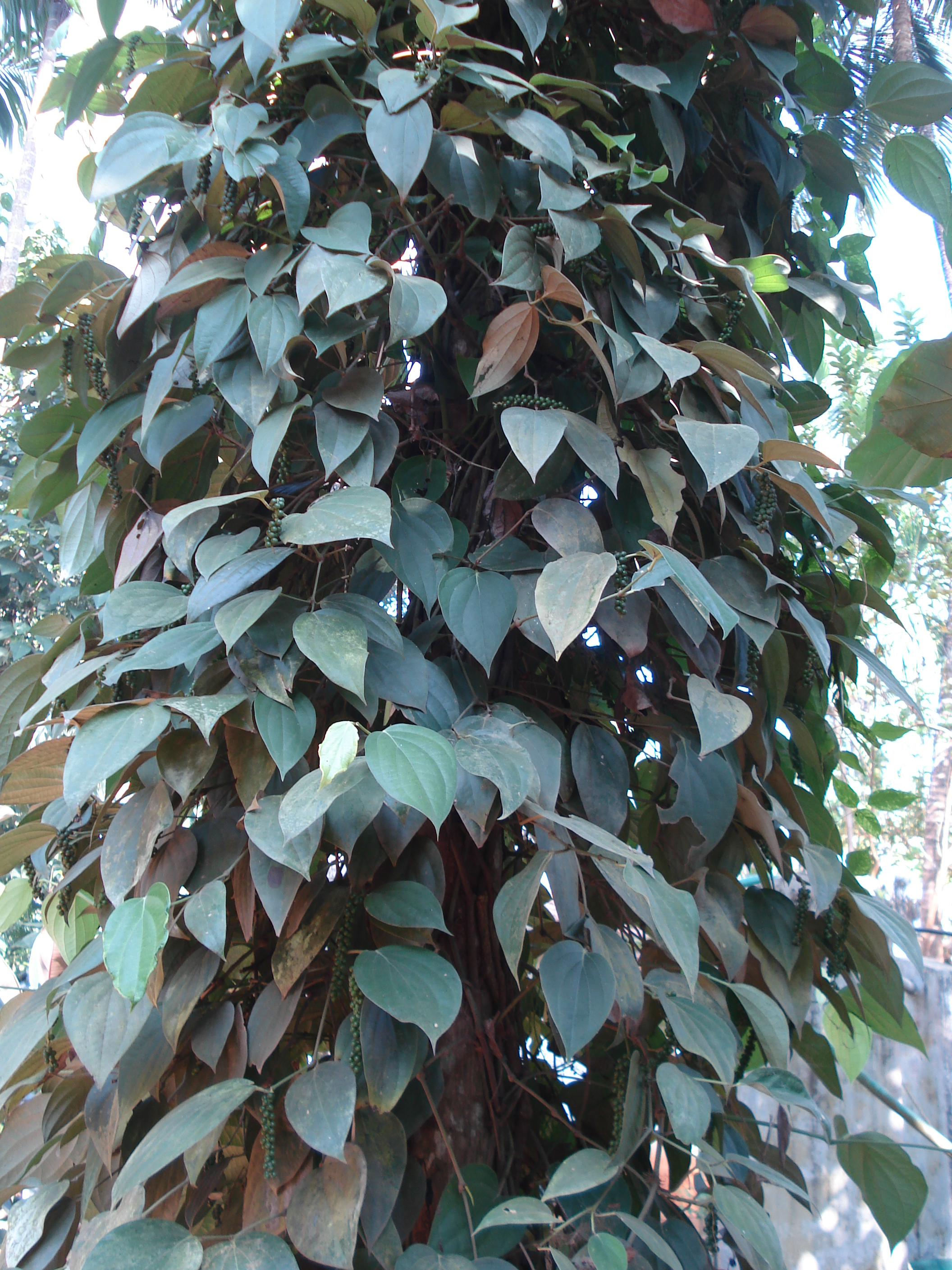 കുരുമുളക് കൊടി